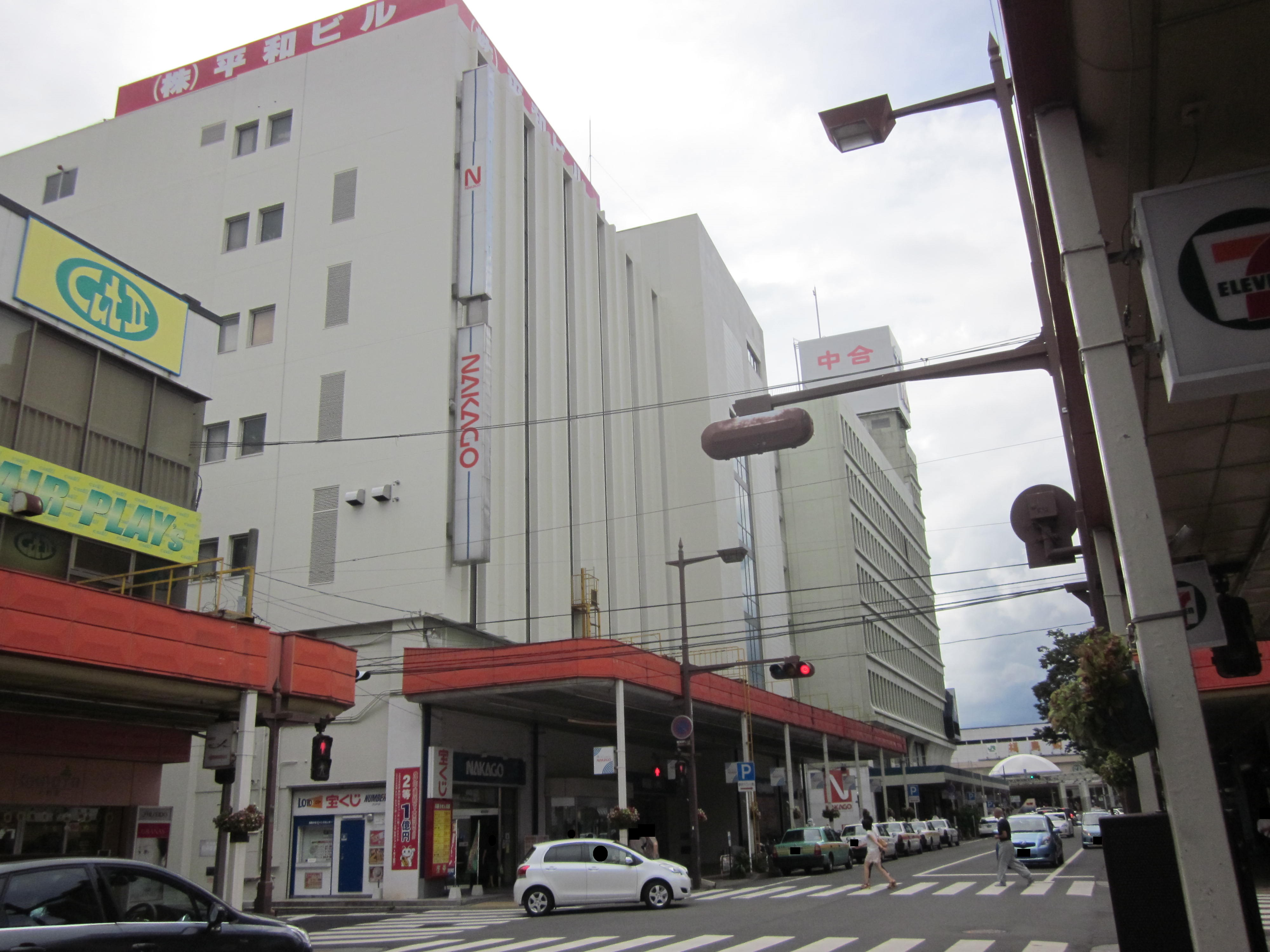 ik06が撮影。手前からニ番館、一番館。